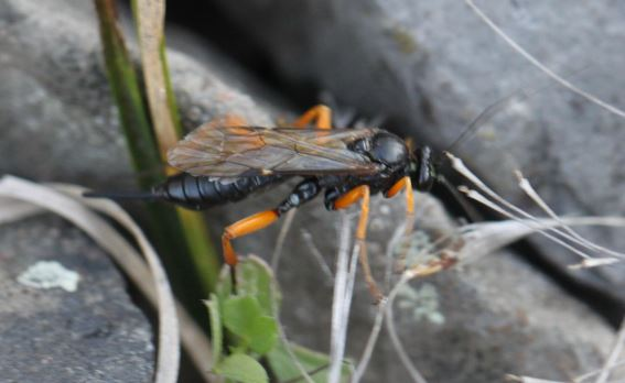 Schwarze Schlupfwespe (Pimpla rufipes), Weibchen, inspiziert die Steine eines Bahndamms, am 10. Oktober 2018 in der Schwetzinger Hardt